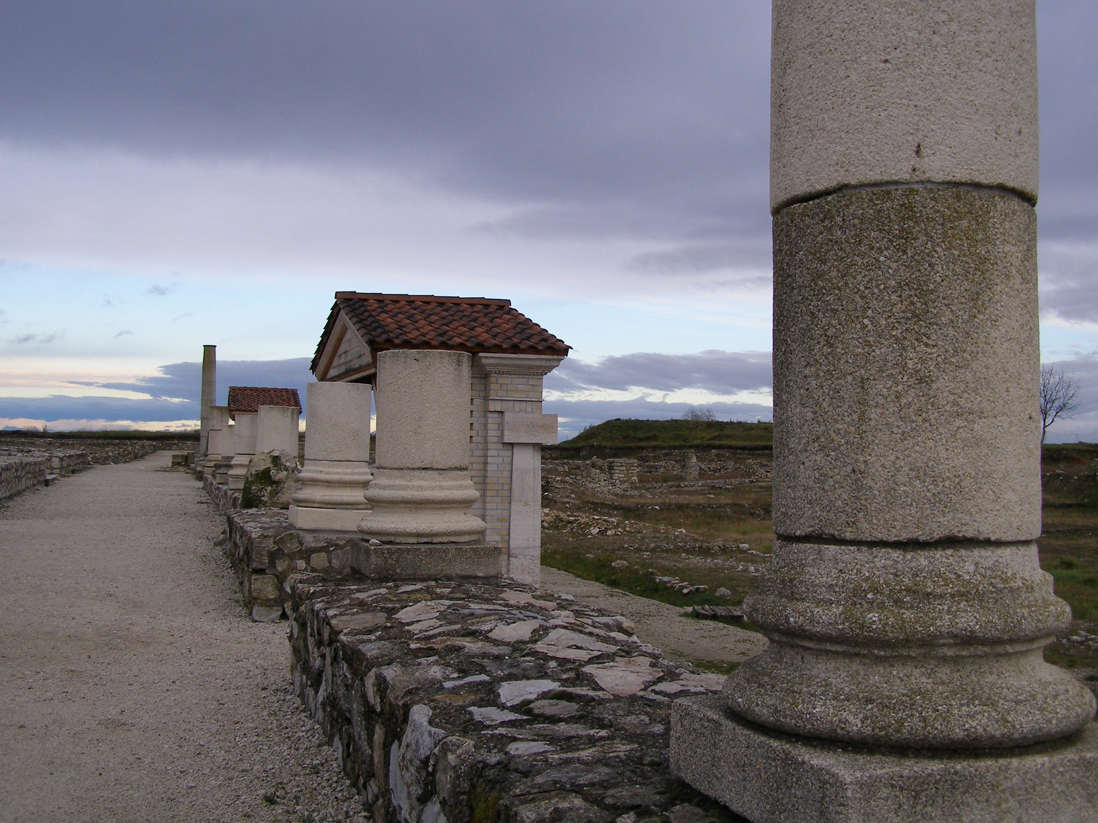 Fövénypusztai római telep (Tác, Fövénypuszta) This is a photo of a monument in Hungary, Identifier: 3940